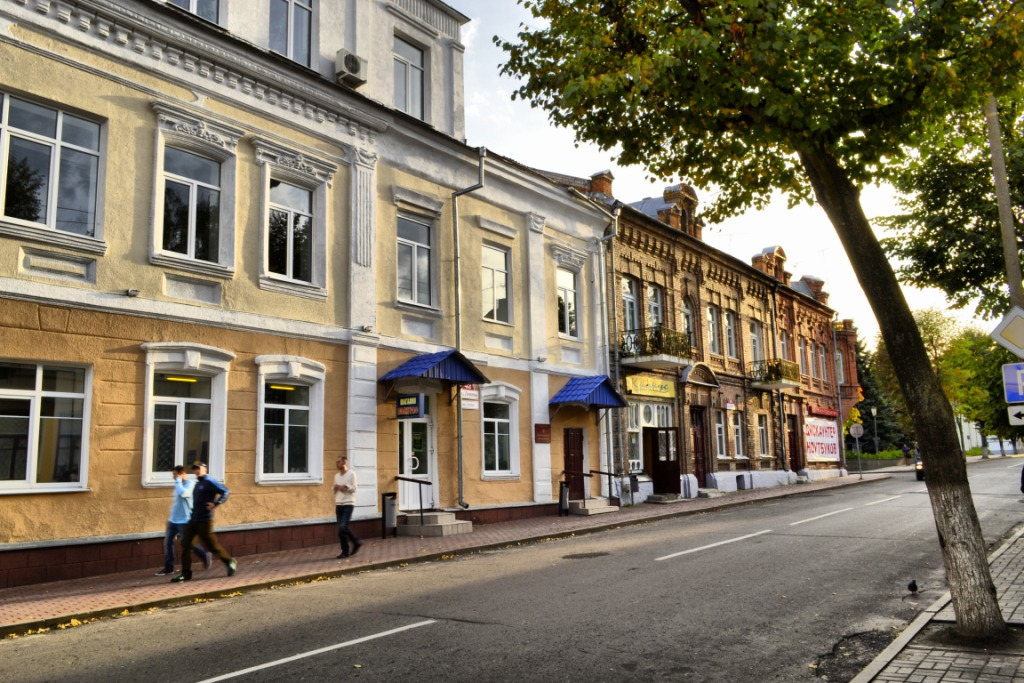 Беларуская (тарашкевіца): Гістарычны цэнтр г. Пінска: будынкі, збудаваньні, планіровачная структура, ландшафт і культурны пласт на тэрыторыі, абмежаванай з захадувул. Чарняхоўскага,з поўначы – вул. Завальнай, па мяжы дваровых тэрыторый дамоў № 1, 7,9, 11, 13, 19, 25, 27 па гэтай вуліцы, вул. Кірава, уключаючы дваровыя тэрыторыі дамоў № 1, 13 па вуліцы Кірава, з усходу – вул. Савецкай, у тым ліку дома № 5 па вул. Іркуцка-Пінскай Дывізіі, дома № 2 па вул. Кулікова, дома № 3 на пл. Кастрычніка, памяжы дваровых тэрыторый забудовы няцотнага боку дамоў № 1, 3па вул. Кіеўскай, да перакрыжаваньняз вул. Альхоўскіх, ад перакрыжаваньня з вул. Дняпроўскай Флятыліі,па вул. Дняпроўскай Флятыліі, уключаючы дваровыя тэрыторыі дамоў№ 39, 41 гэтай вуліцы, з поўдня —левым берагам р. Піна да перасячэньня з вул. Чарняхоўскага. г. Пінск This is a photo of Belarusian heritage monument. Reference number: 112Е000529 ( WLM)